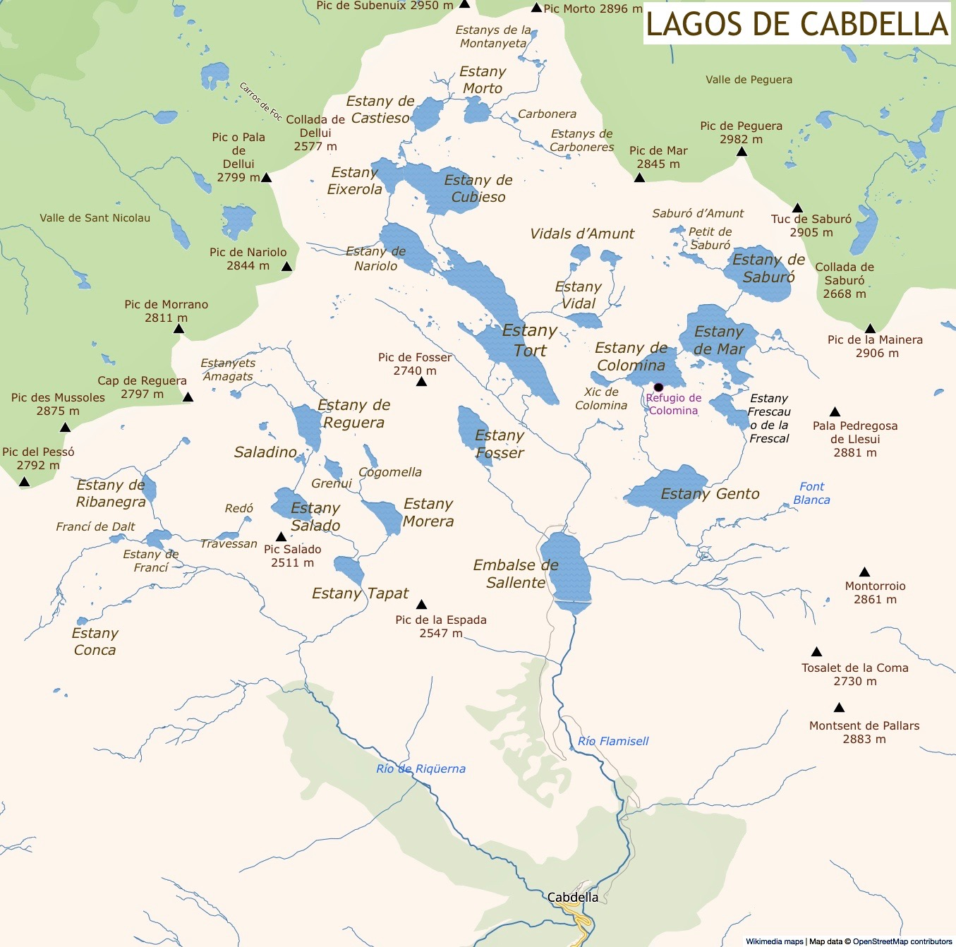 Lagos de Cabdella y cimas que rodean la cuenca de la cabecera del río Flamisell